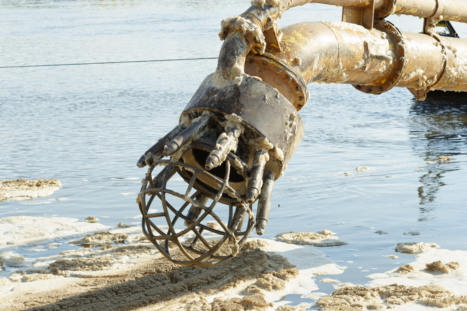 Pogłębiarka „Sawa” - głowica. This is a photography of Natura 2000 protected area with ID PLB140004